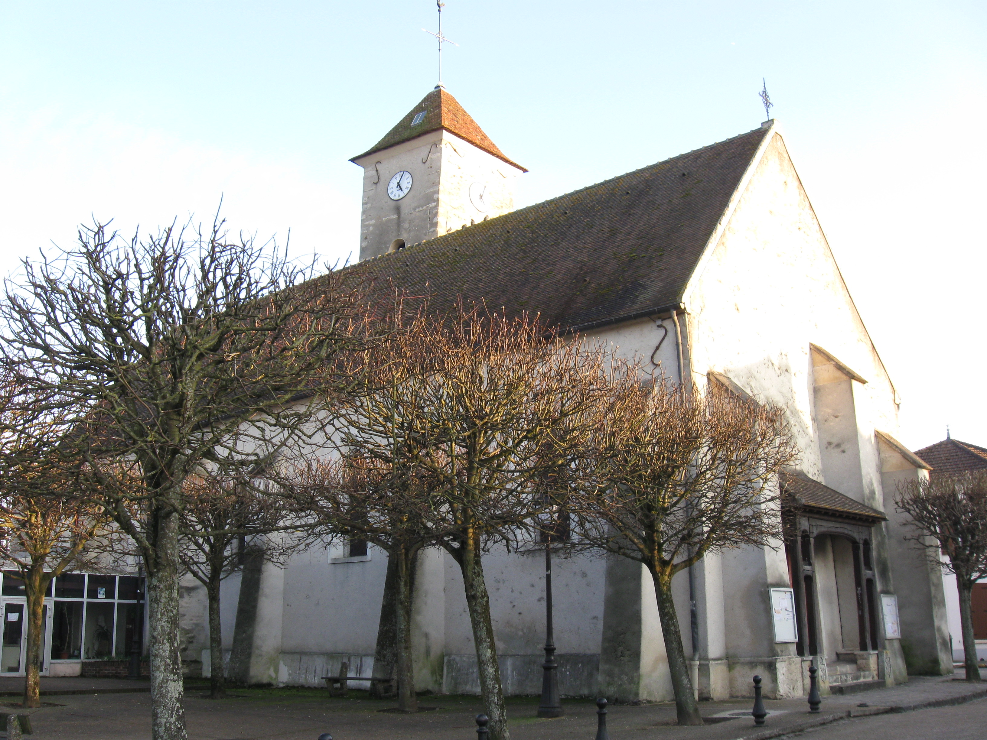 Église Saint-Germain de Roissy-en-Brie. (Seine-et-Marne, région Île-de-France).